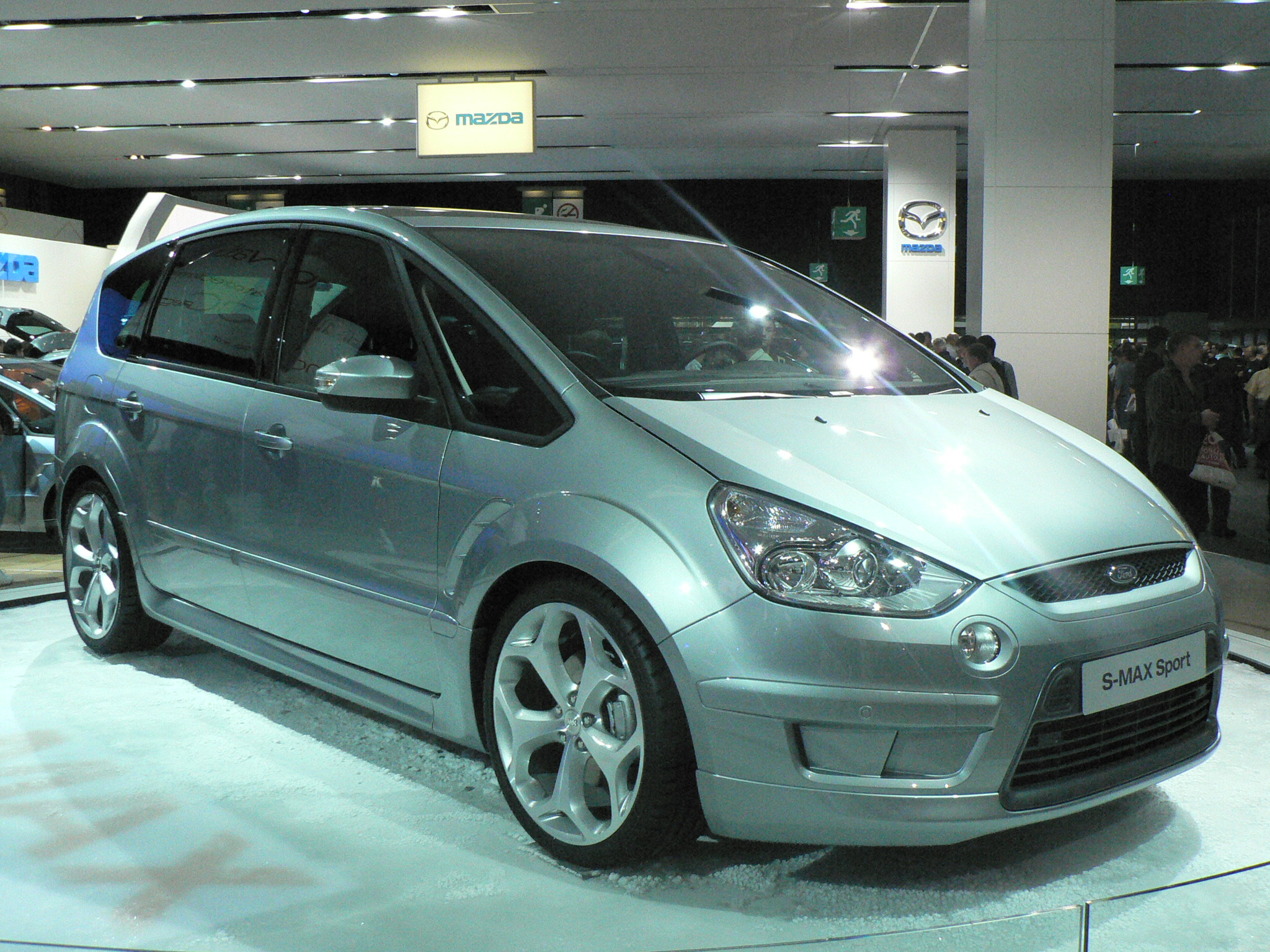 Mondial de l'automobile, Paris 2006